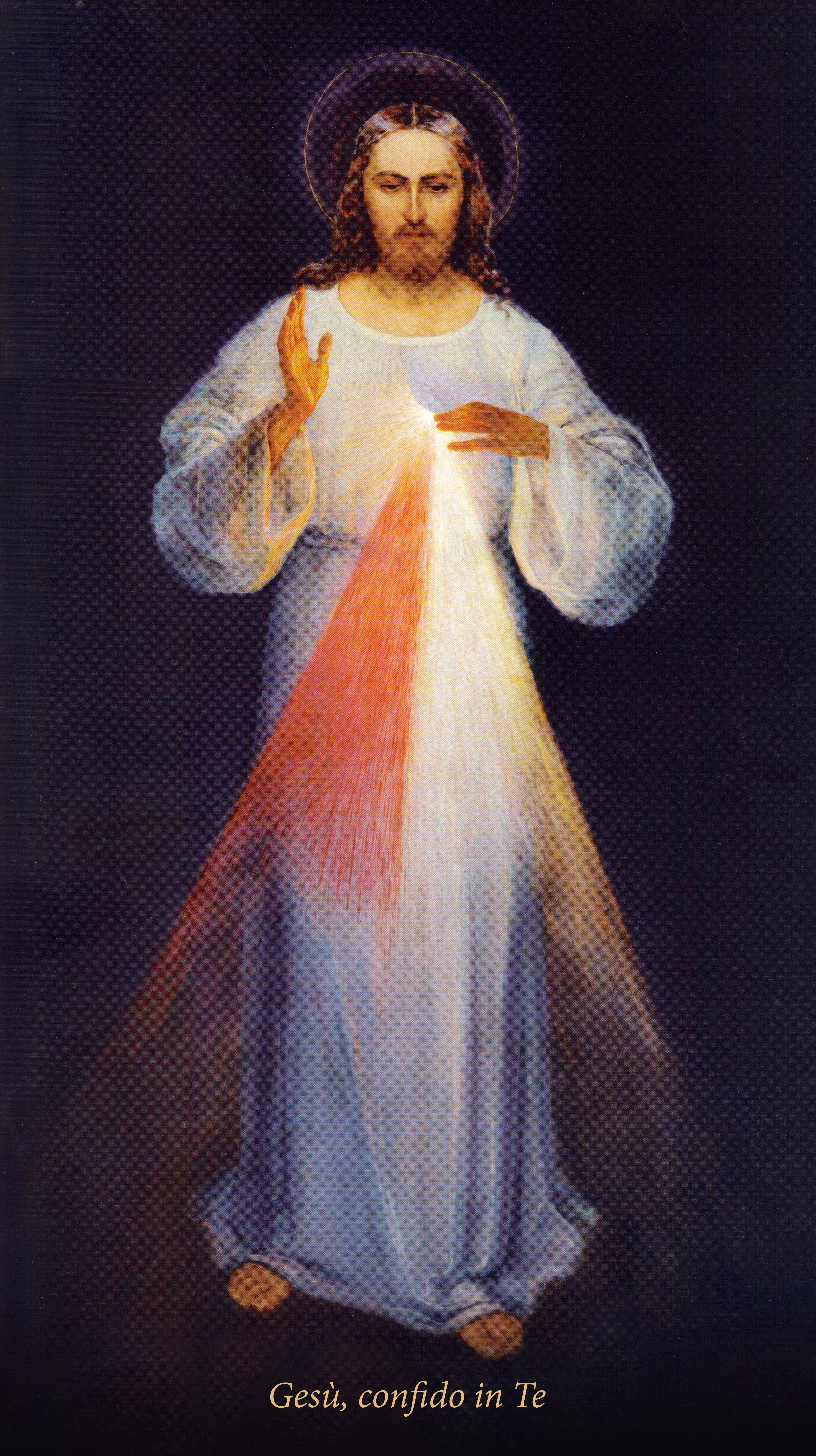 Gesù misericordioso dipinto da Kazimirowski 1934